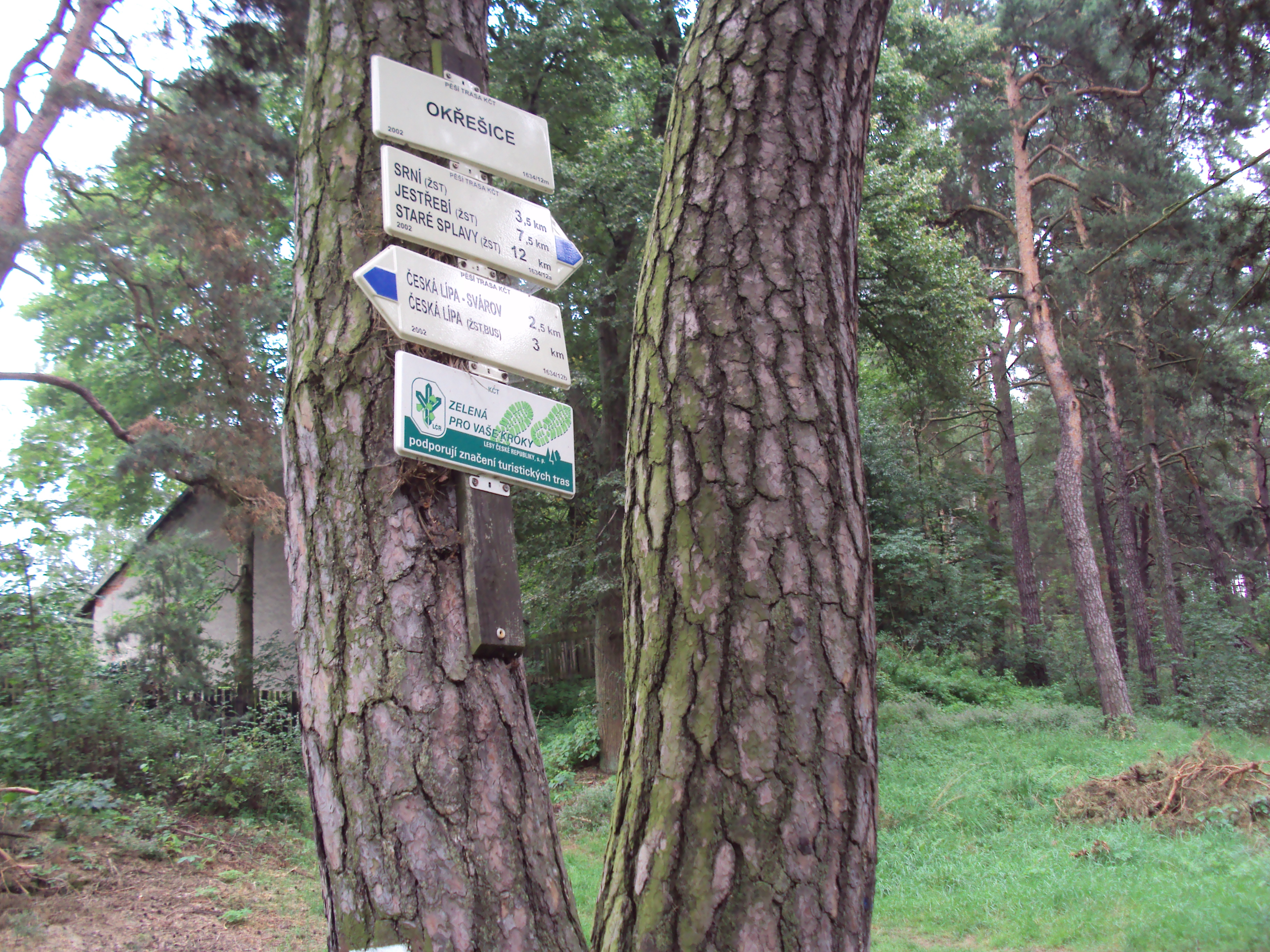 Turistický rozcestník zkraje obce Okřešice u České Lípy